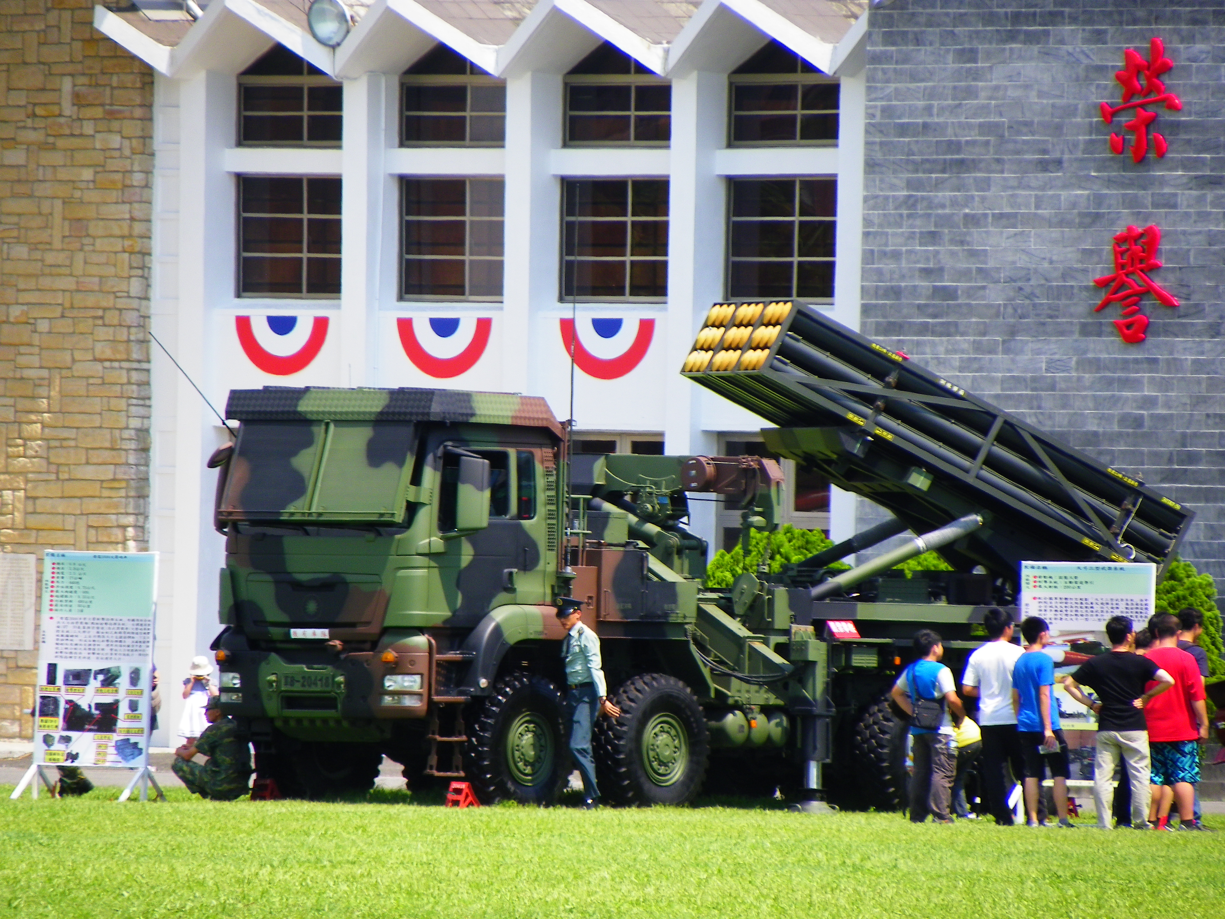 2014年陸軍官校營區開放活動，教育展示館前展示的雷霆2000多管火箭系統。